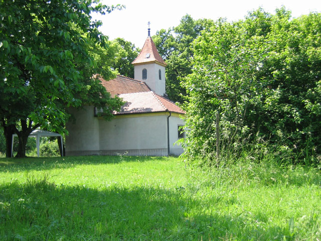 Kirche Parbasdorf: Lizenz: GNU FDL Quelle: Foto plp Datum: de:2004 Ort: Parbasdorf, Niederösterreich